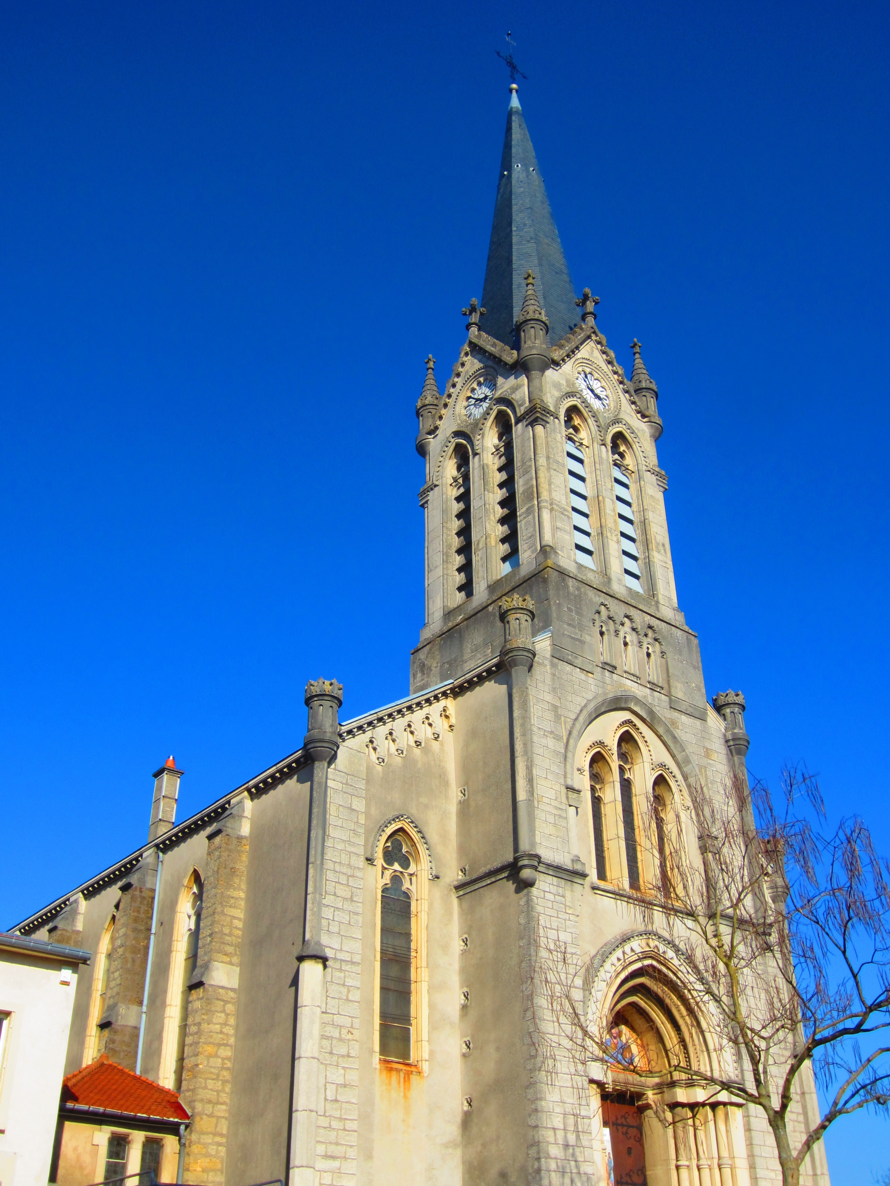 Laxou st genest